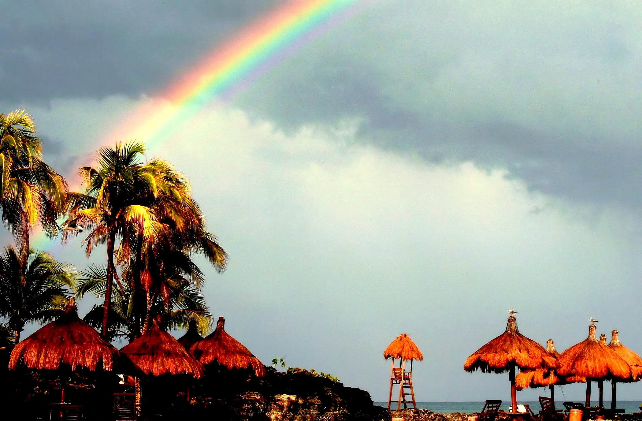 Xcaret , Mexico